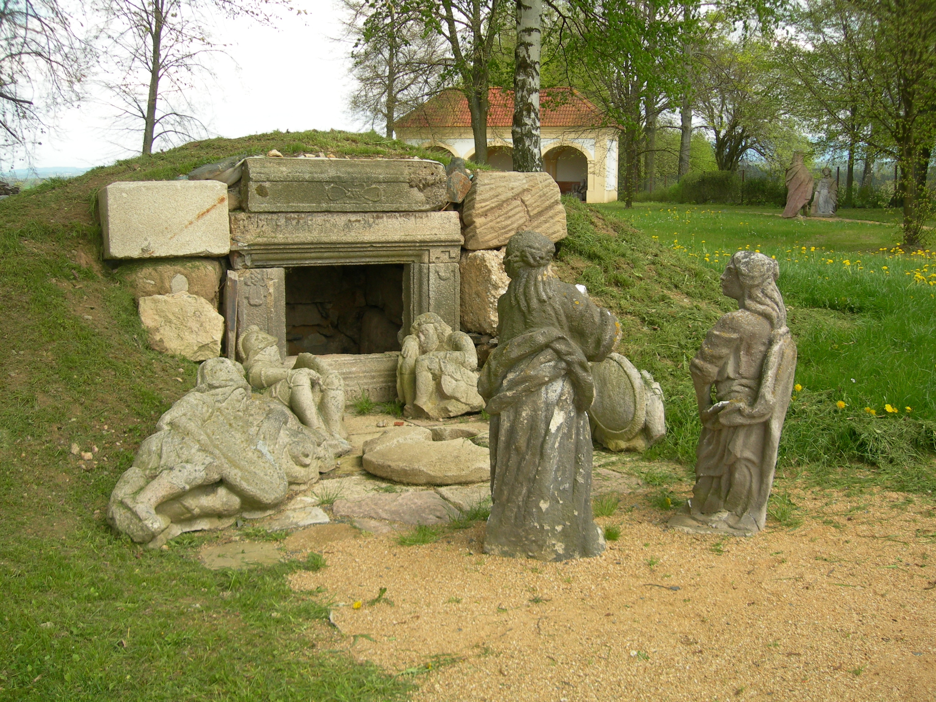 Loreta, zřícenina (Hrozňatov), Hrozňatov